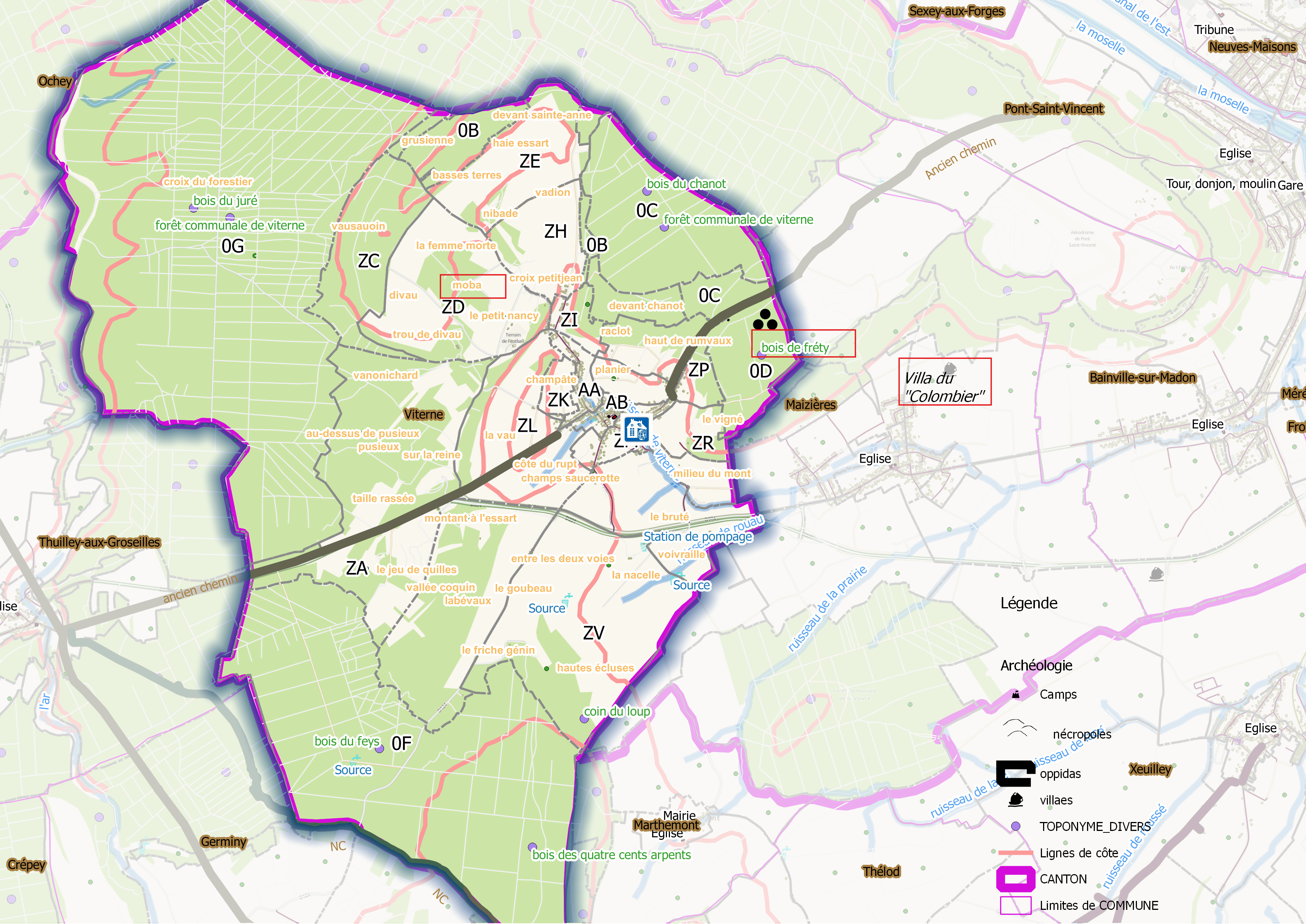 Viterne (ban communal) OSM et Qgis, mentions additionnelles